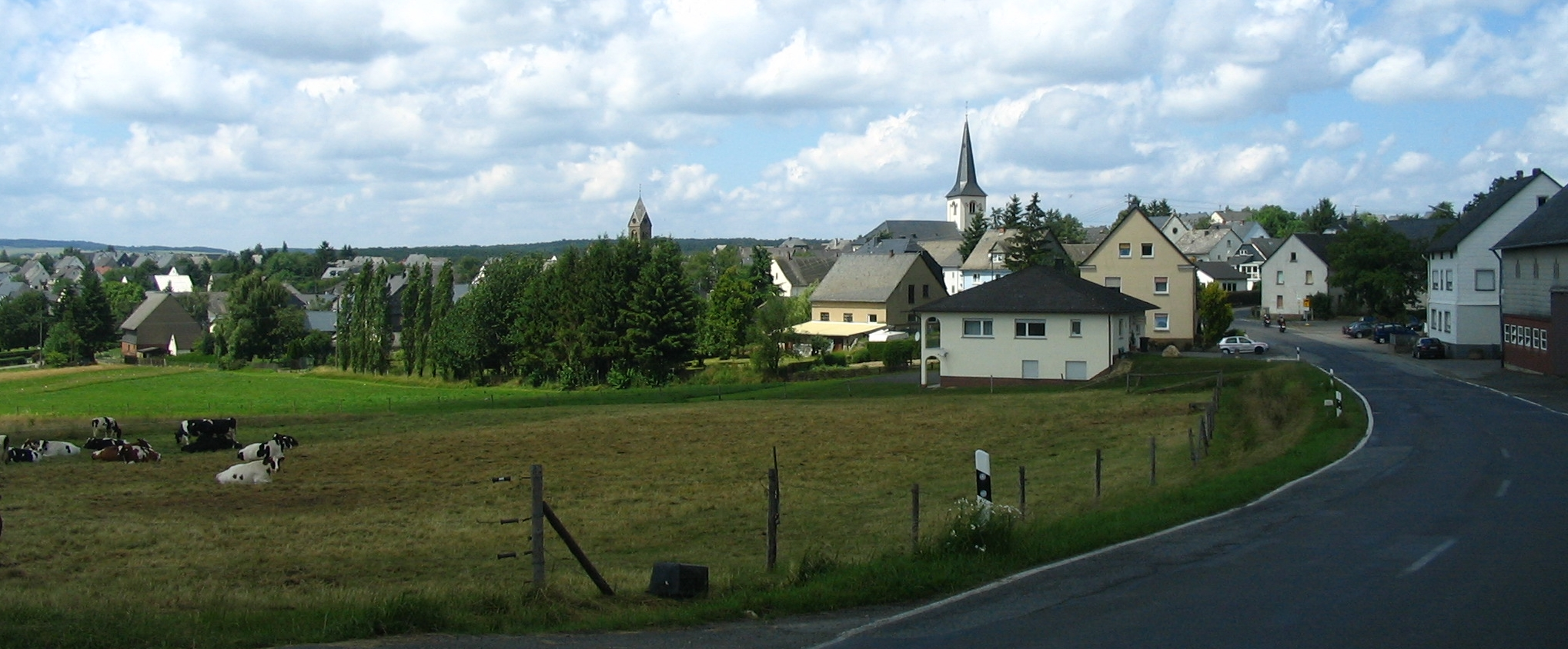 Laufersweiler in the Hunsrueck area, Germany